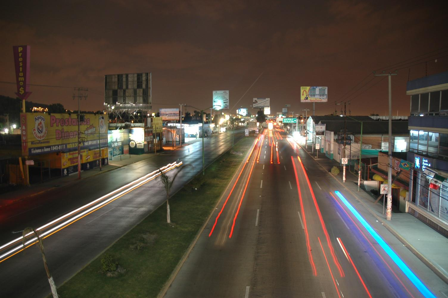 Av. Lopez Portillo Nocturna